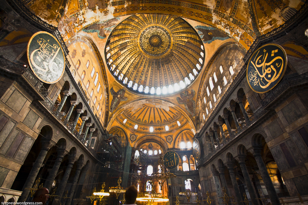 Aya Sofia